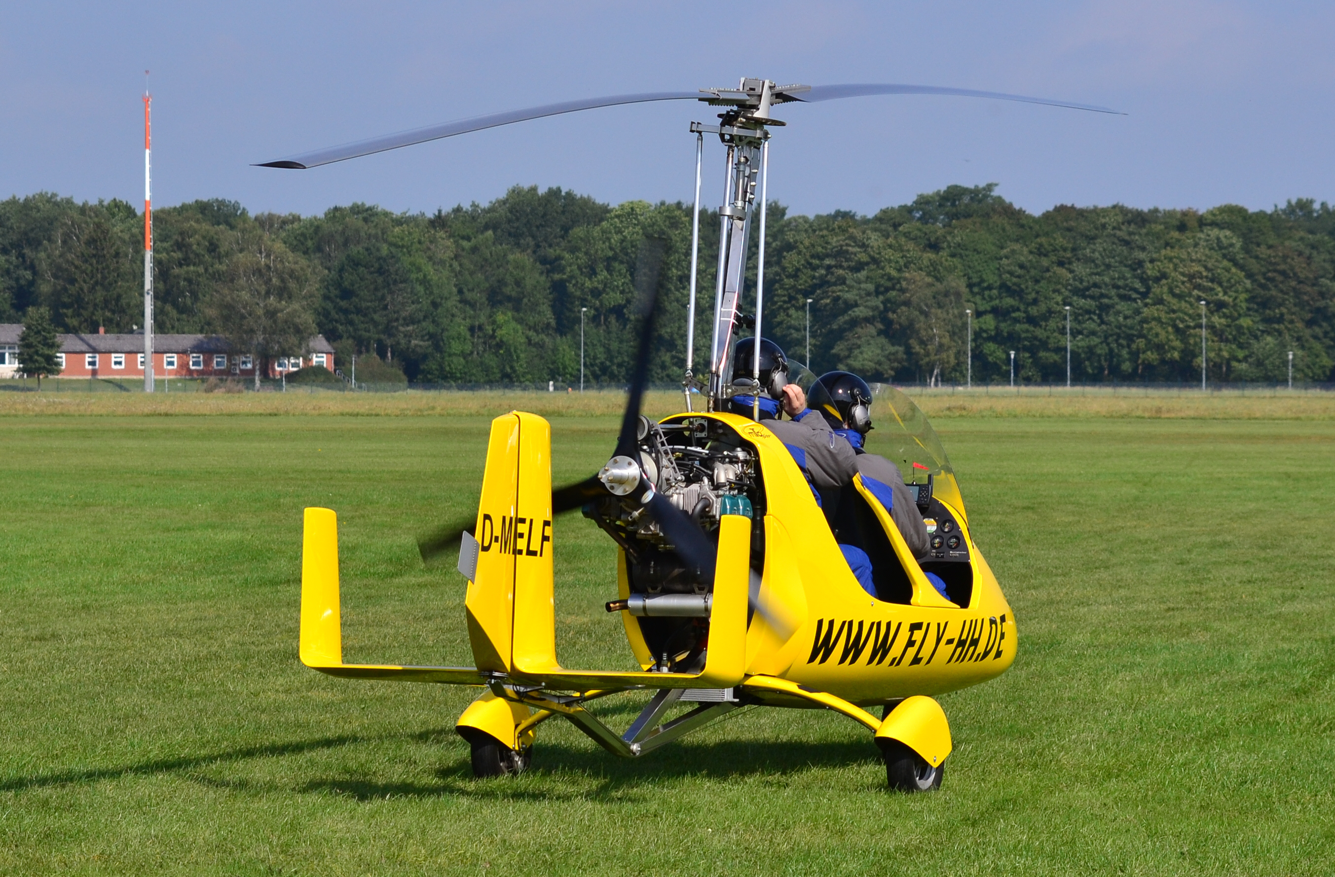 AutoGyro Europe MTOsport (D-MELF) auf dem Flugplatz Uetersen